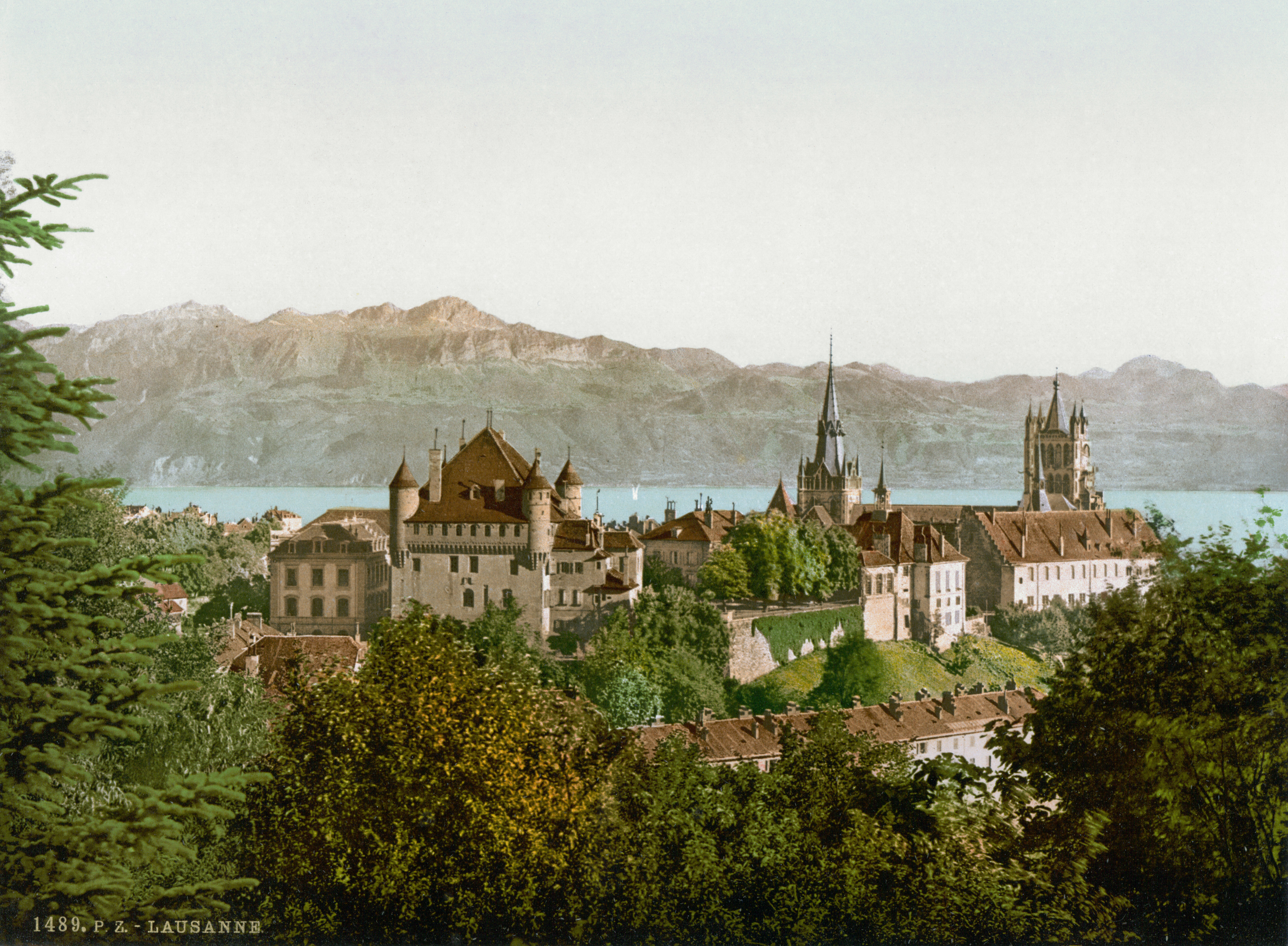 View of Lausanne (Switzerland).